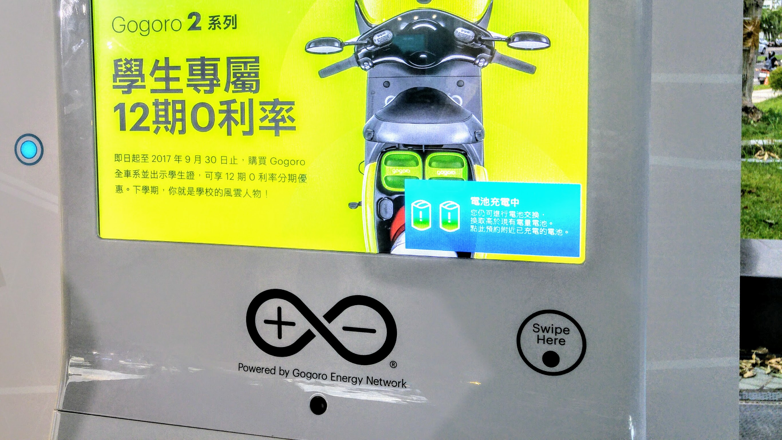 這是一台顯示「電池充電中。」提示的 GoStation 主體螢幕。